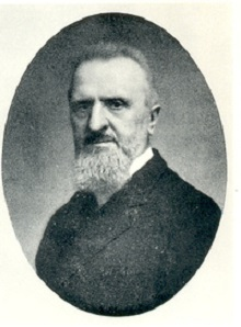 Gioele Solari